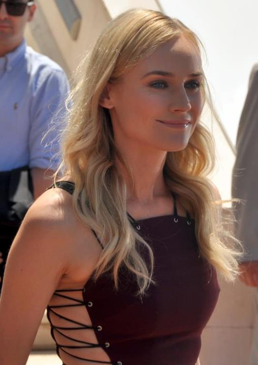 Diane Kruger au festival de Cannes